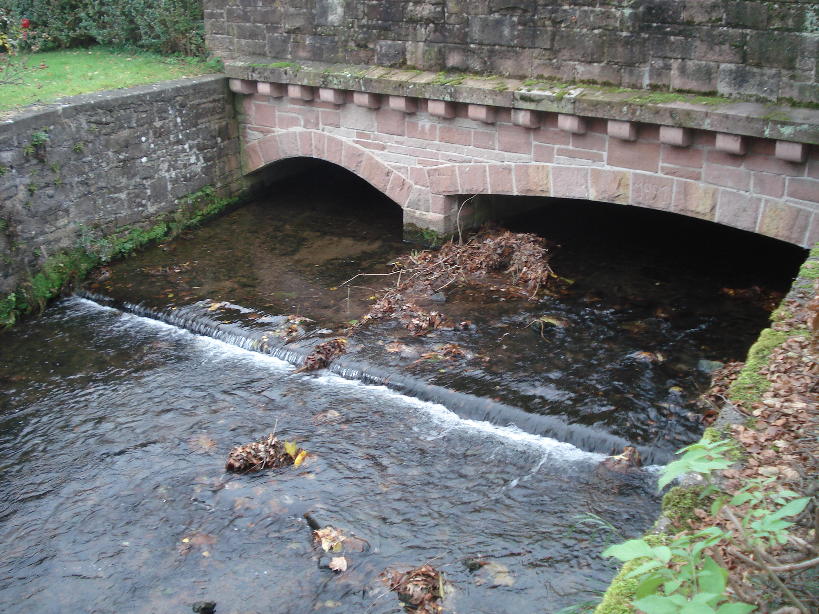 Die Hasel (Brückenbogen links) mündet in die Orb (Brückenbogen rechts)